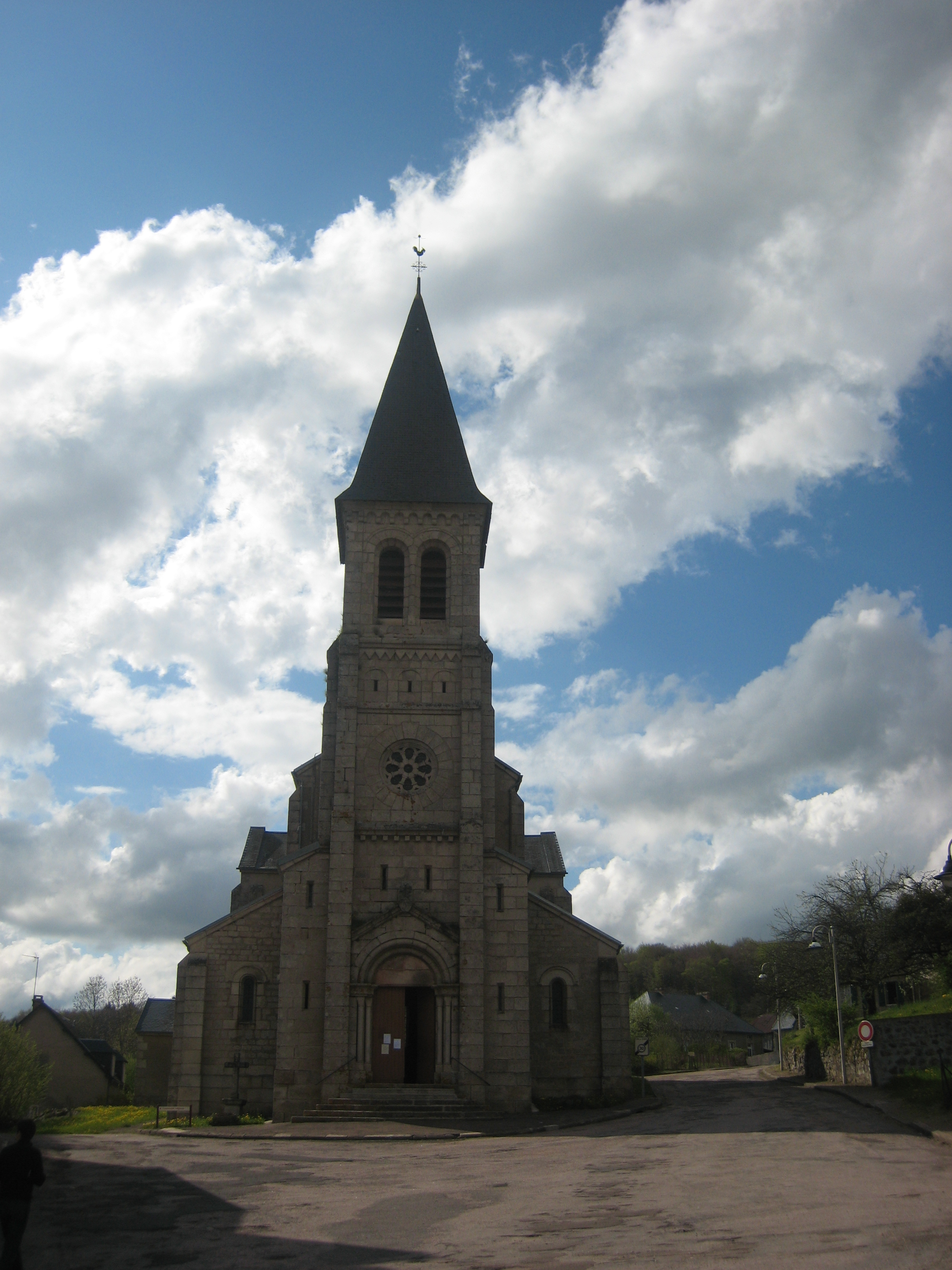 École de Montsauche-les-Settons